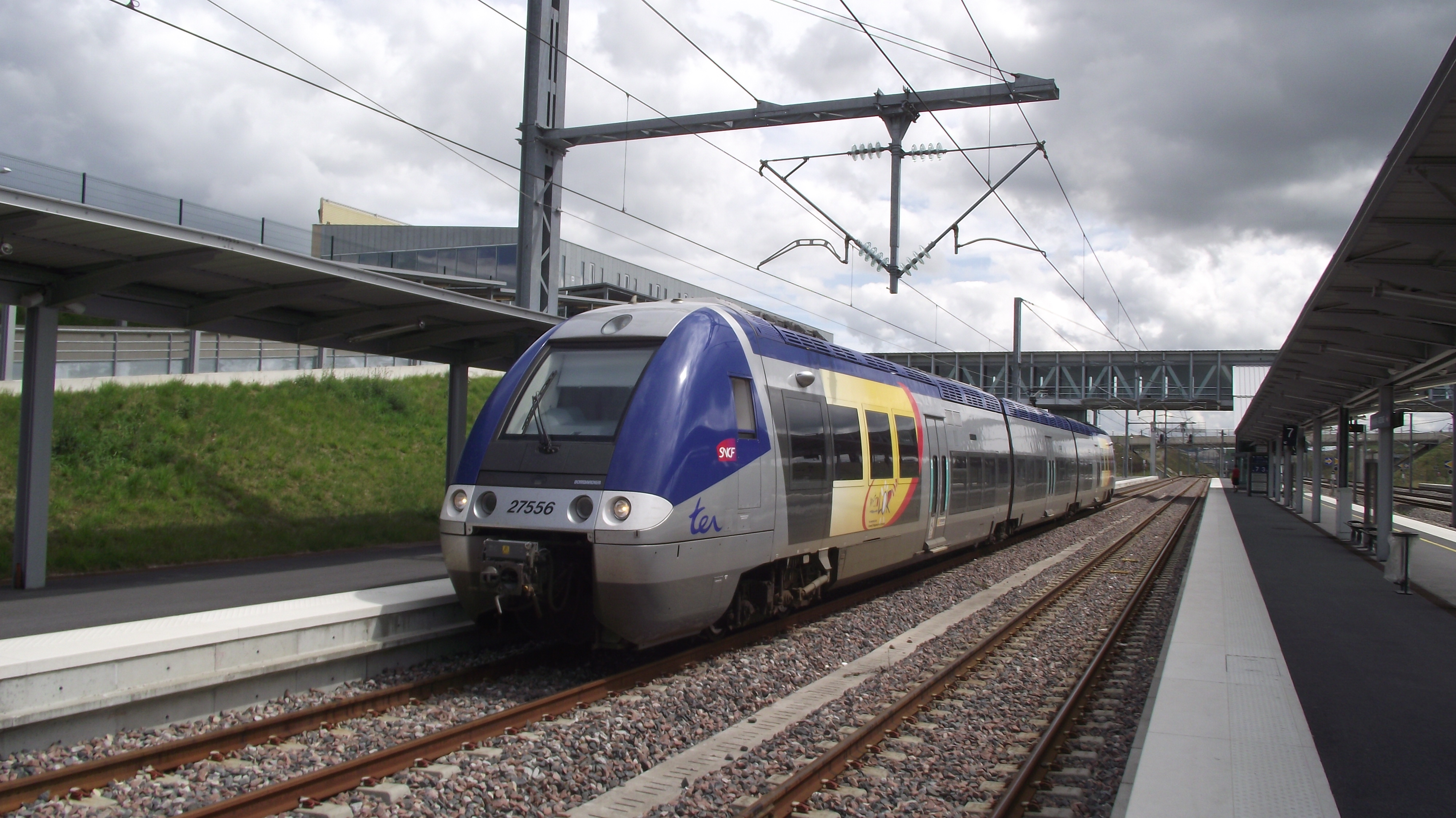 TER trein in het station Champagne-Ardenne TGV